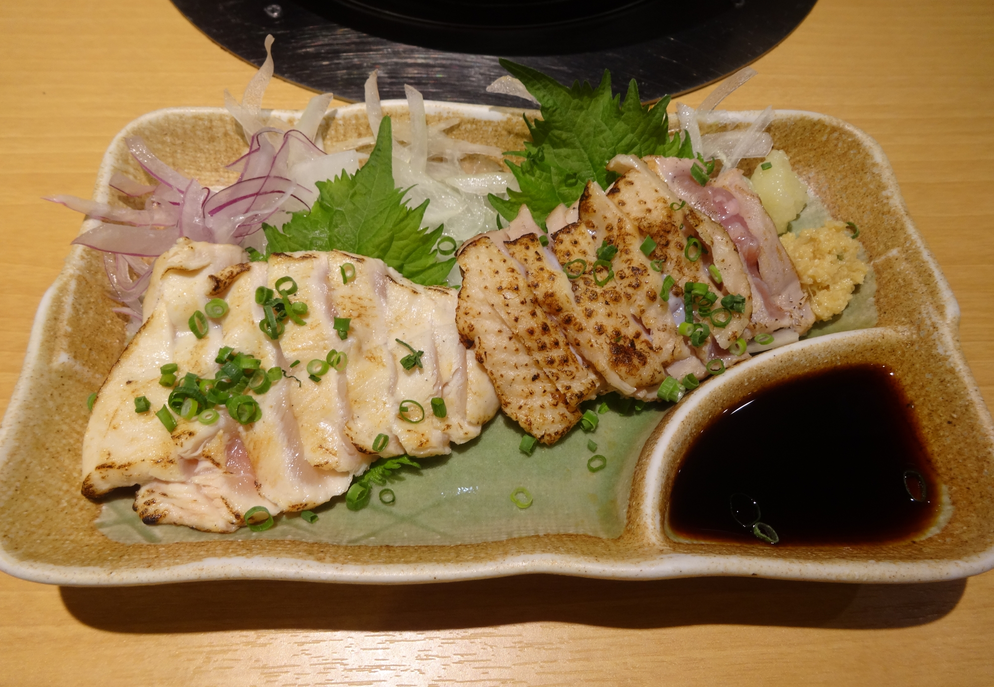 黒さつま鶏の炙りたたき（鹿児島県鹿児島市、みやま本舗鹿児島中央駅店より撮影）